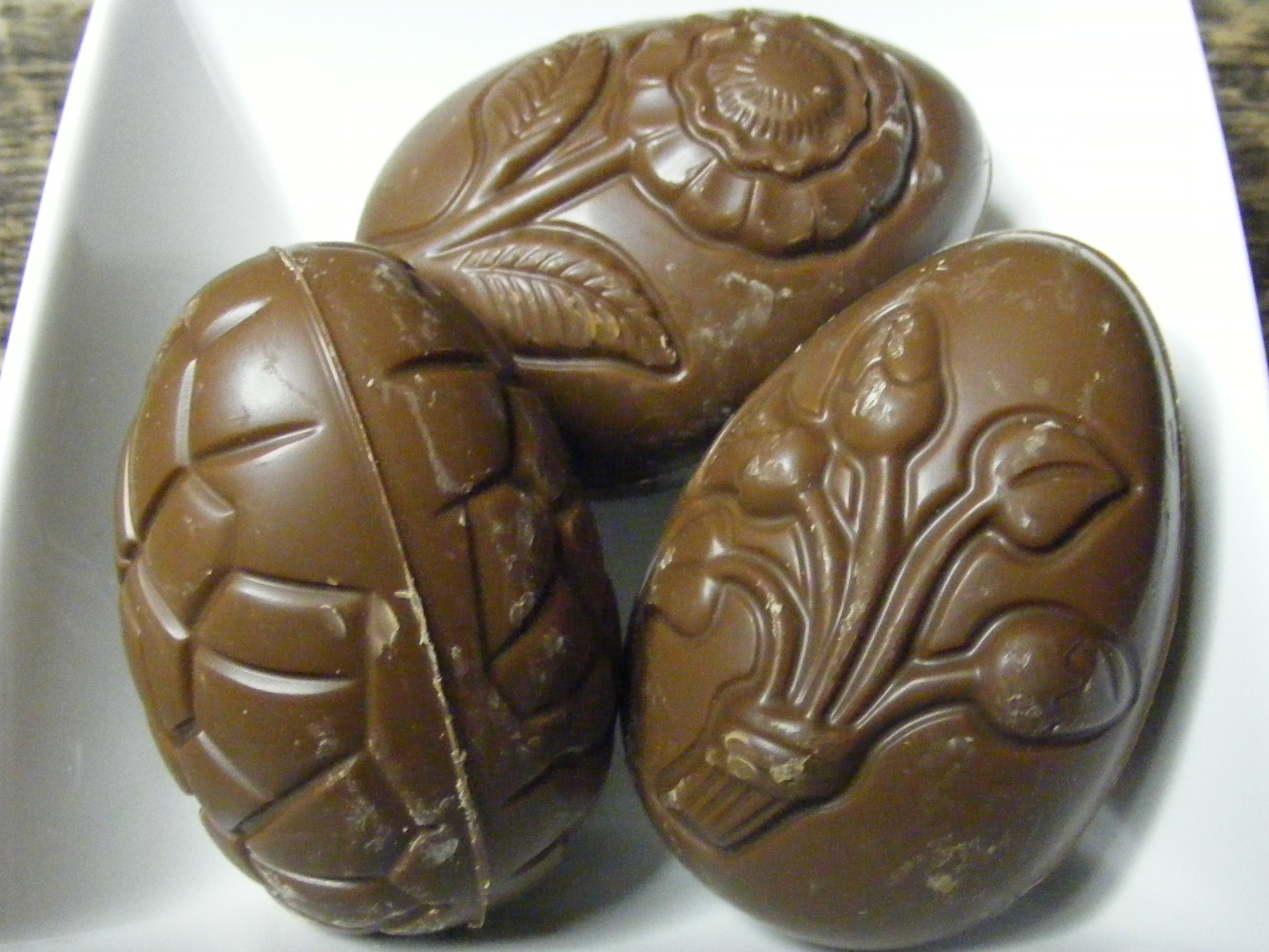 Schokoladeneier